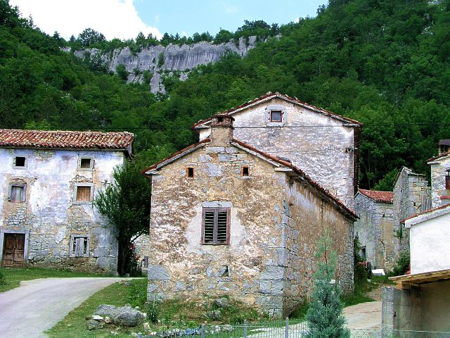 Podgace